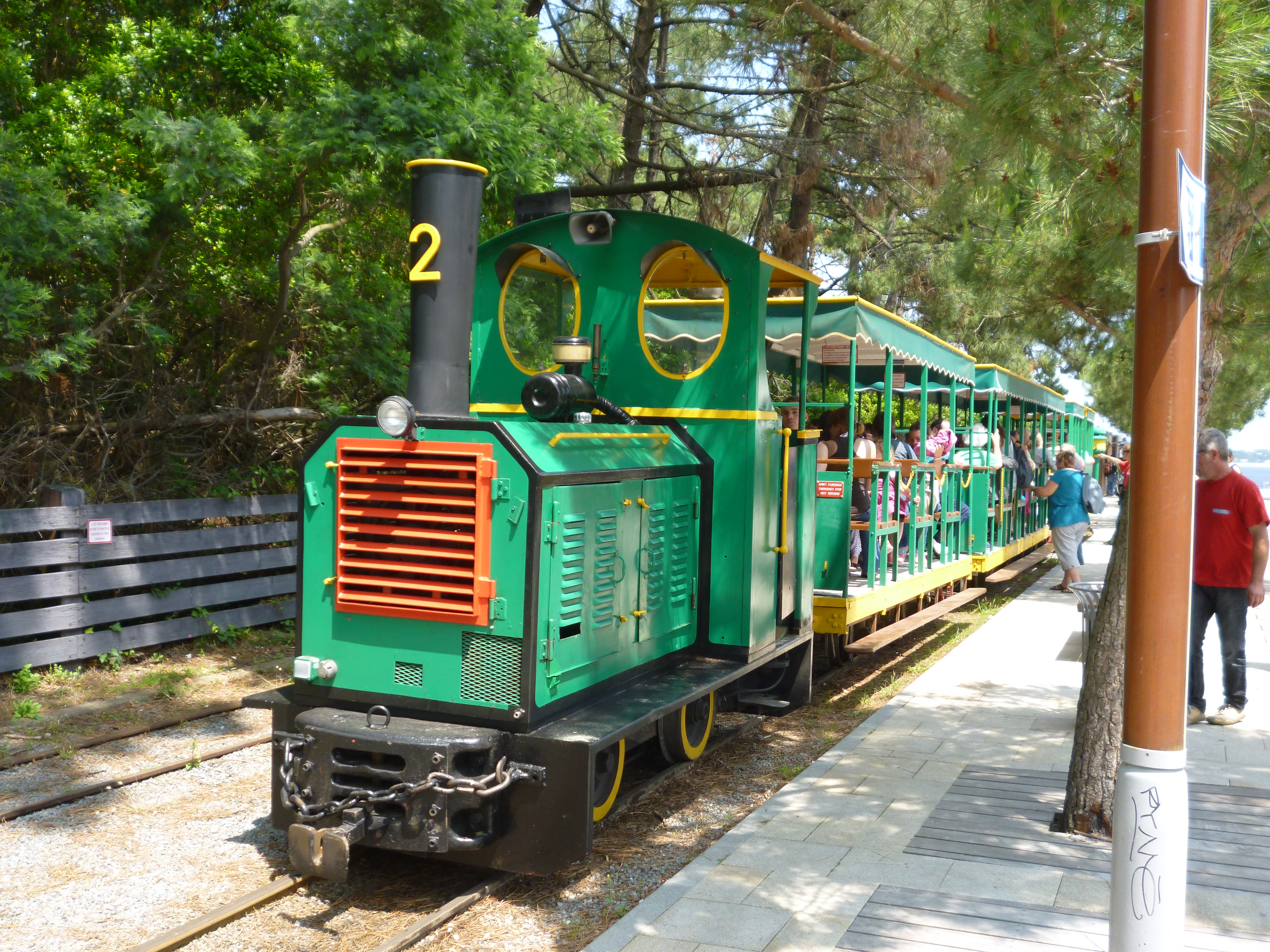 Tramway du Cap-Ferret an der Starthaltestelle Bélisaire